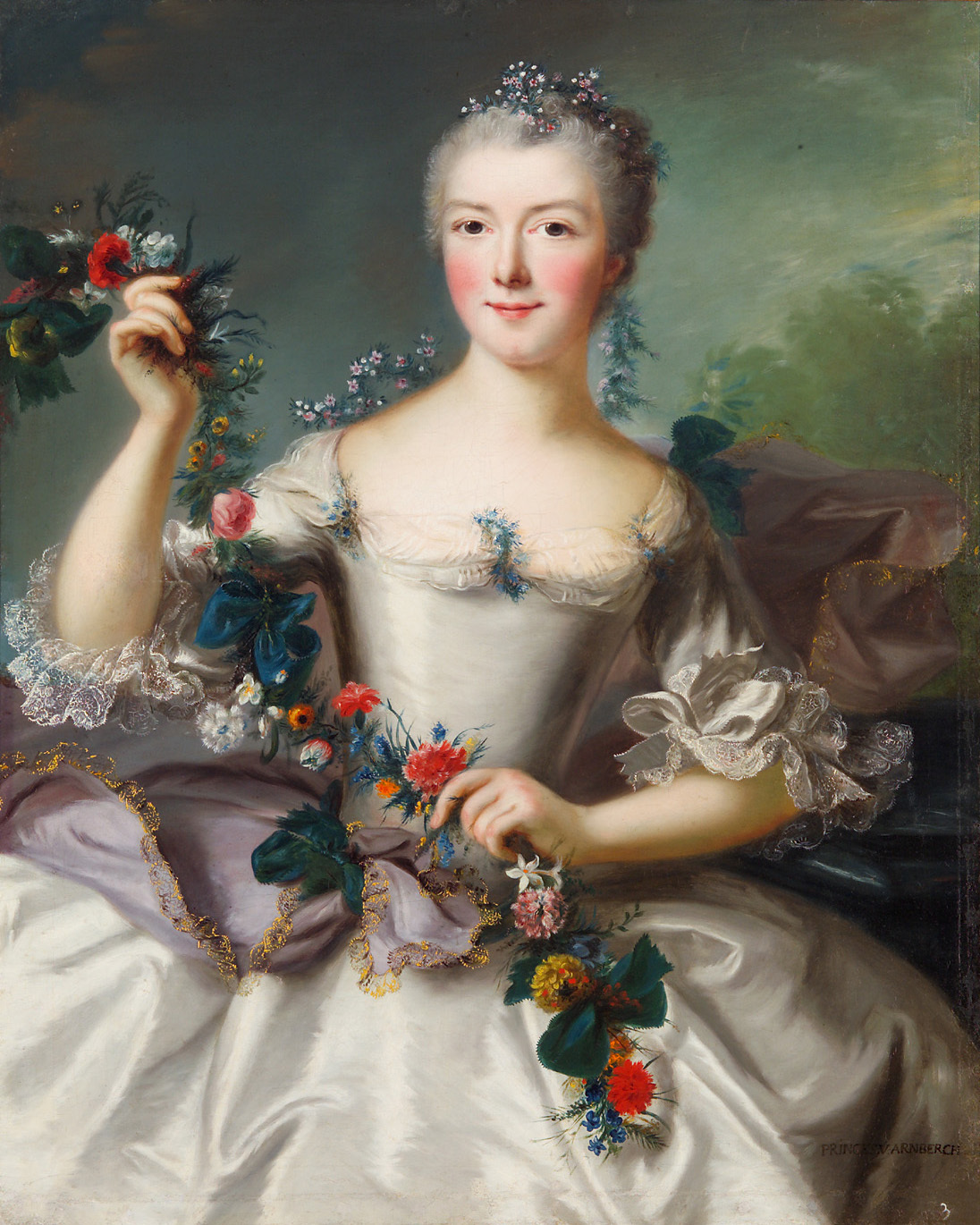 Rechts unten spätere Beschriftung: PRINCES.V:ARNBERCH; hinten: LOUISE COMTESSE DE LA MARCK: mariée au PRINCE D'AREMBRG: A°1748: le 23. Juin